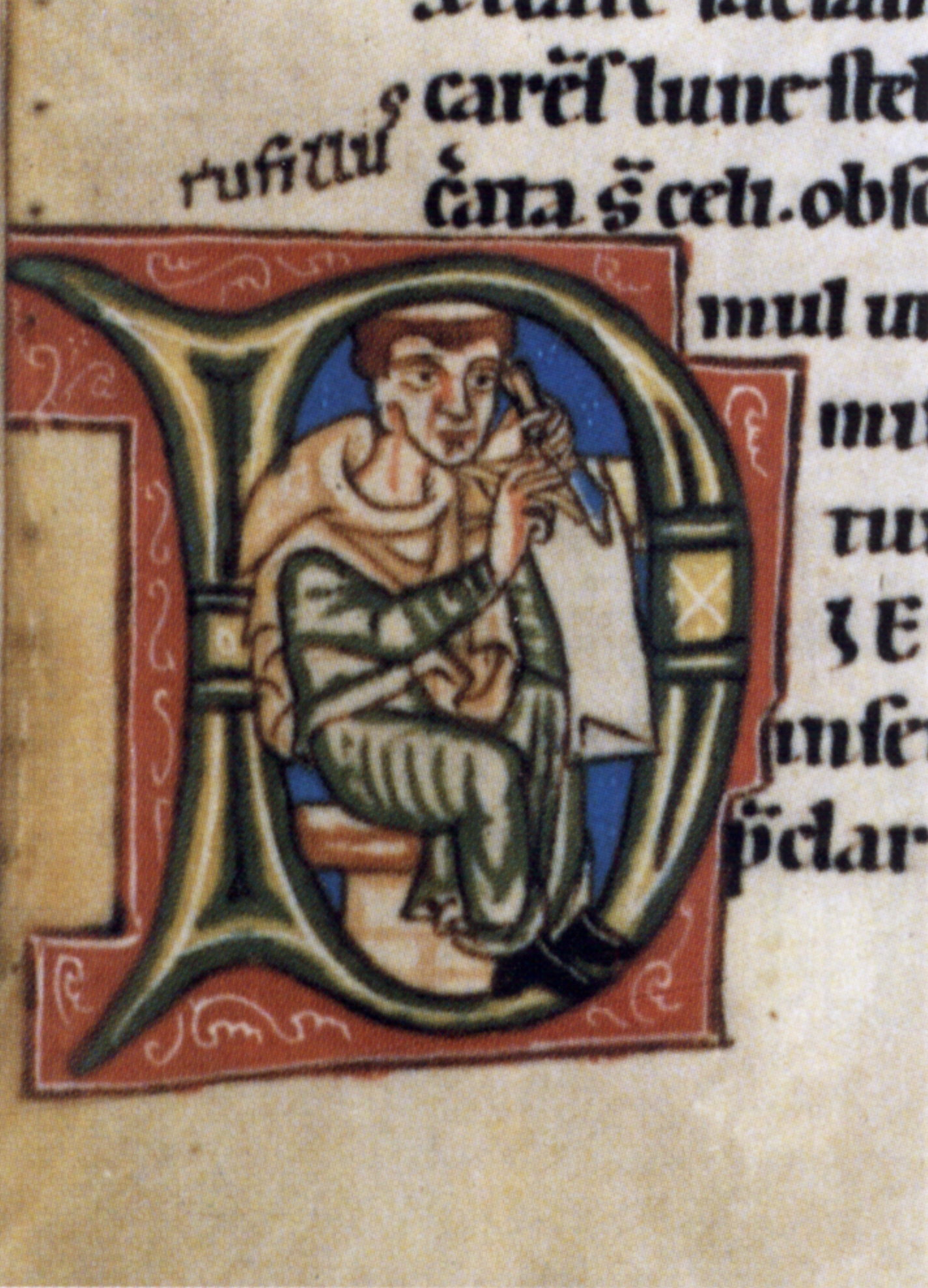 Initiale D mit einem Selbstportrait des Schreibers Rufillus (eventuell tätig im Weißenauer Skriptorium)